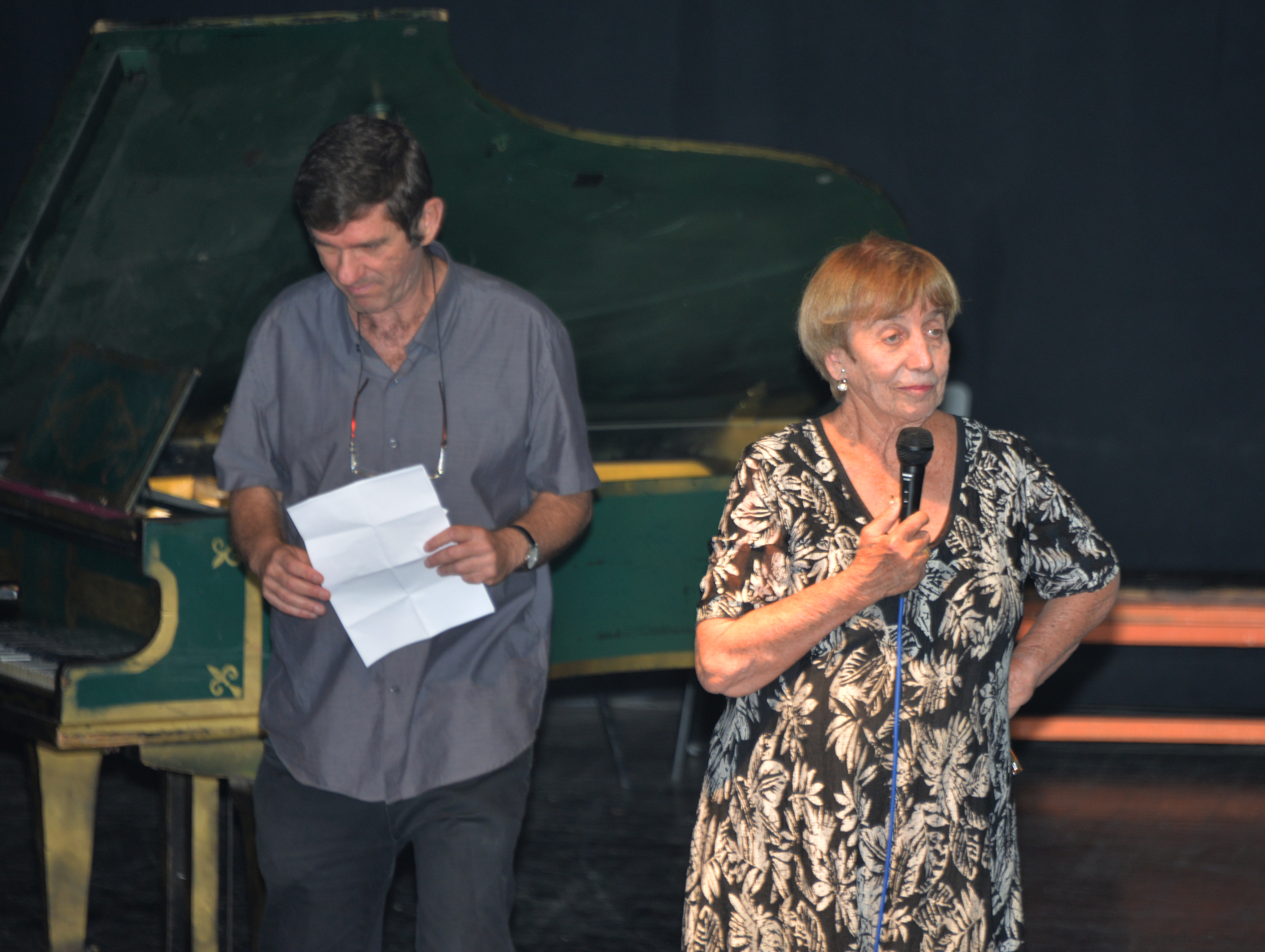 המנהלת הקודמת חנה לויטה והמנהל הנוכחי גלעד אמיר